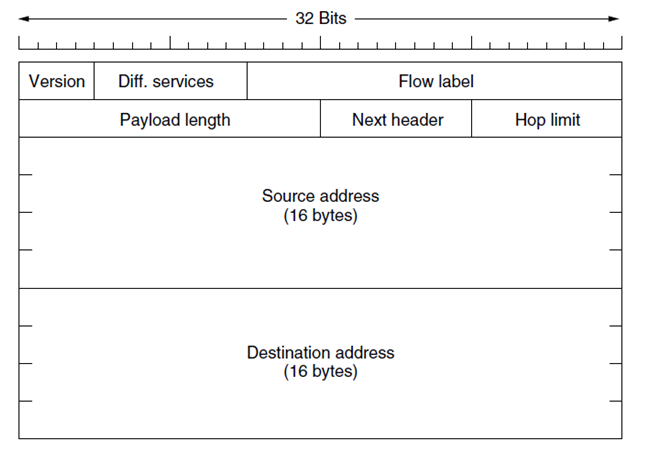 IPv6-nın başlığı